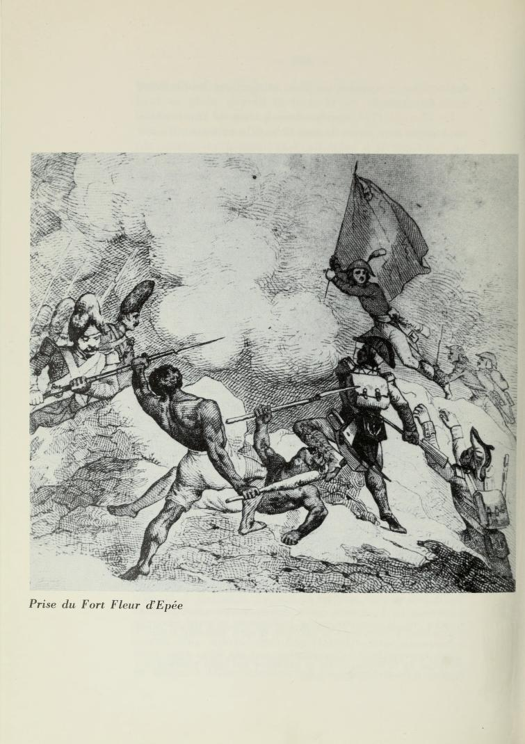 Prise du fort Fleur d'Epée, 1794, gravure in Auguste Lacour.- Histoire de la Guadeloupe, Basse-terre, 1857. Tome Deuxième, 1789-1798. Réimpression : Edition et Diffusion de la culture antillaise, 1976. La prise du fort Fleur d'Epée|fort Fleur d'Epée a eu lieu le 3 juin 1794 à Pointe-à-Pitre en Guadeloupe